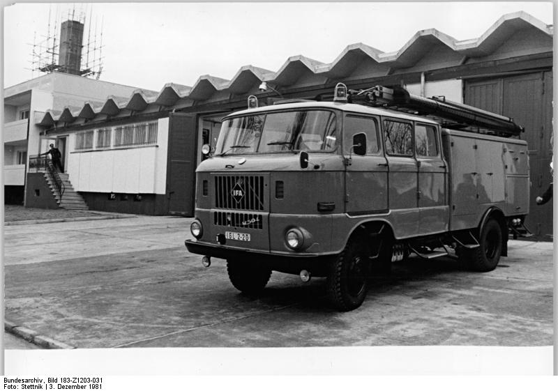 Berlin, Wartenberg, Feuerwache, Löschzug ADN-ZB Settnik 3.12.81 Berlin: Das neue Gebäude der Feuerwache von Berlin-Wartenberg wurde in elf Monaten errichtet. Bis 1992 werden weitere 29 derartige Objekte in der Hauptstadt fertiggestellt werden. Dieser neue Typ enthält neben den Funktionsräumen auch Wohnungen für Mitglieder der Feuerwehr. Auch ein neuer Löschzug steht seit heute der Freiwilligen Feuerwehr des Ortsteils Wartenberg im Stadtbezirk Weißensee zur Verfügung.